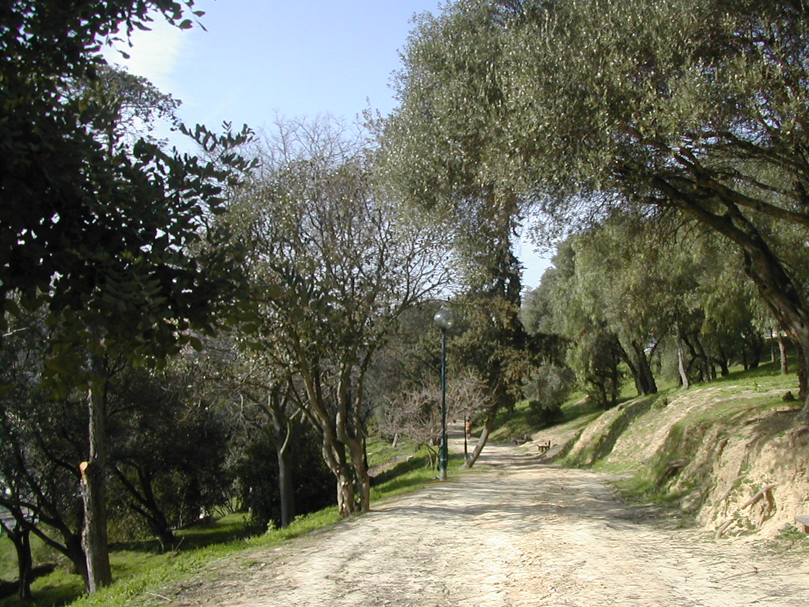 Parque da Madre de Deus, Lisboa, Portugal